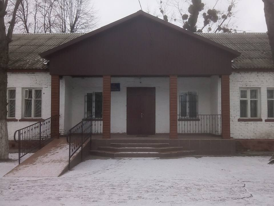 Оновлена Черкаська ДМШ № 5 після ремонтних робіт.